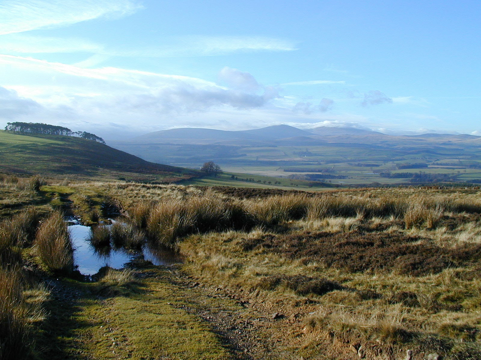 Bewick Moor